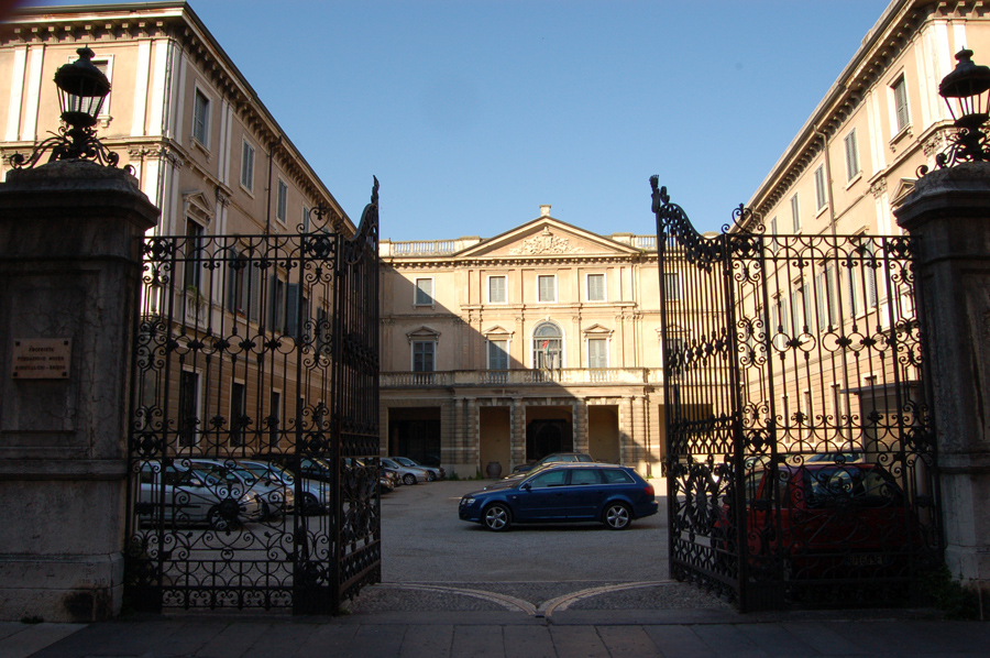 Fotografia del palazzo della fondazione Miniscalche Erizzo a Verona